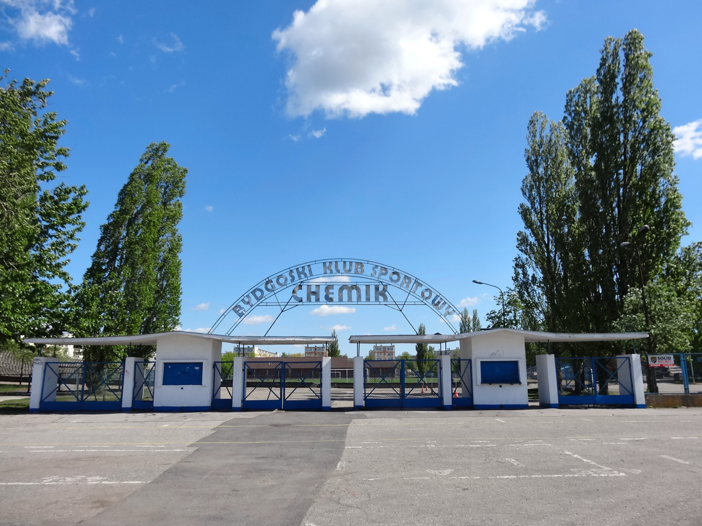 Stadion Chemika Bydgoszcz na os. Wyżyny